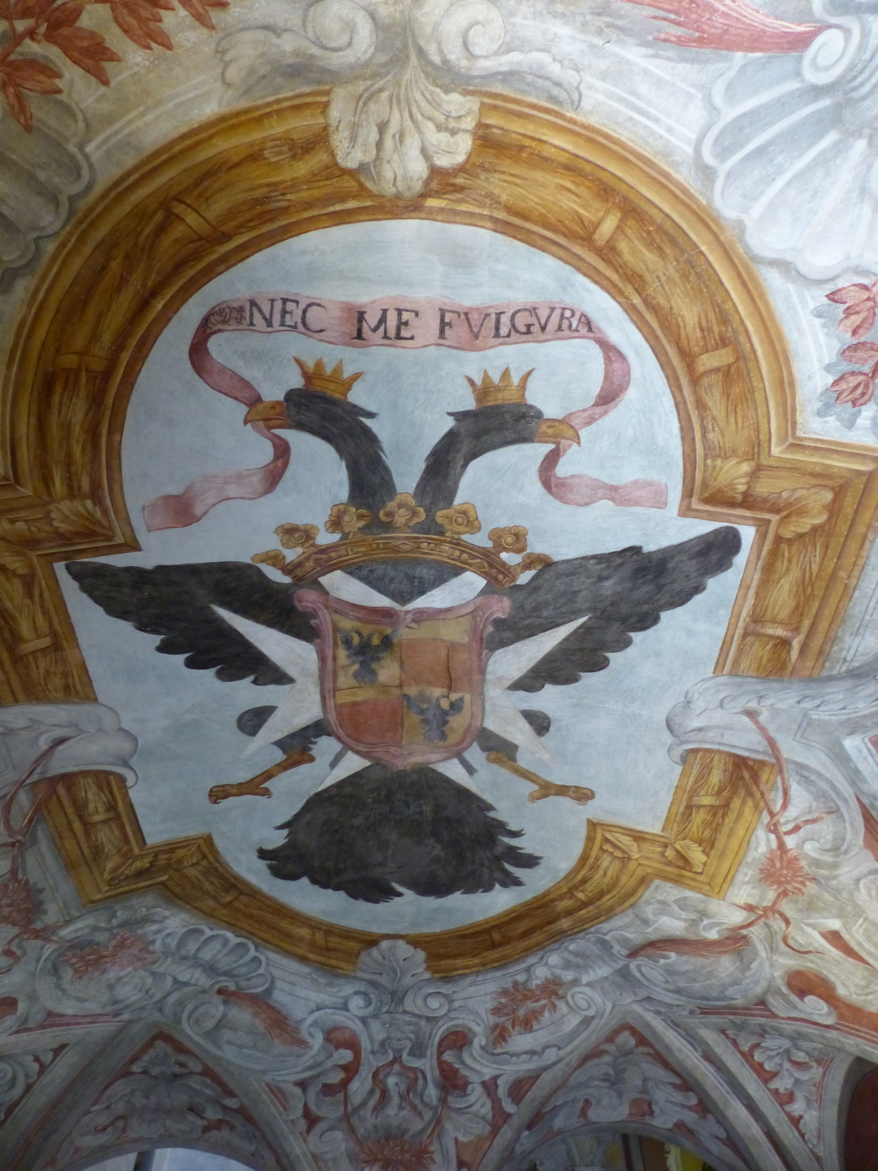 Nice (Alpes-Maritimes, France), au cœur du Vieux Nice, le palais Lascaris avec, entre autres, sa fabuleuse collection d'instruments de musique anciens, la deuxième de France.